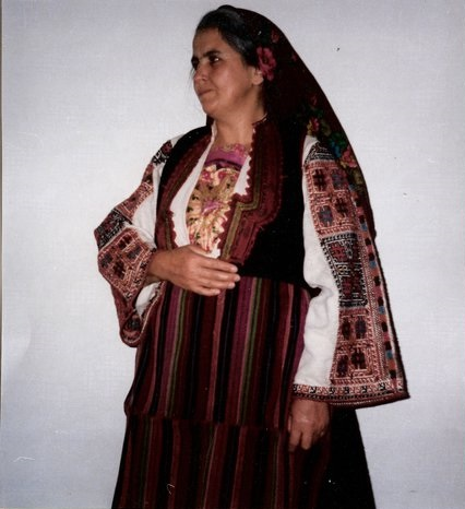 Селска_носия_от_Бабчор_от_средата_на_19_век.